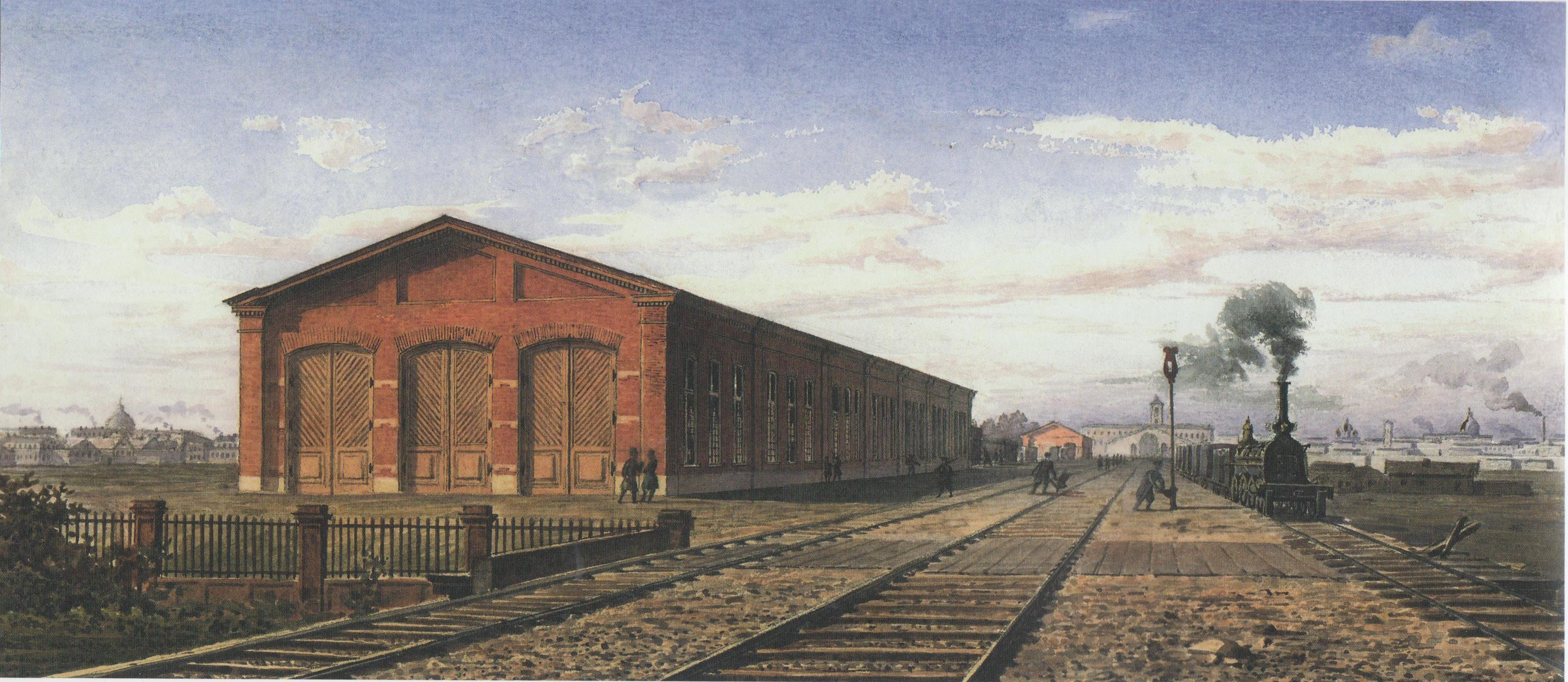 Акварель Александра Христофоровича Кольба. Изображён вагонный сарай Петербурго-Московской железной дороги.